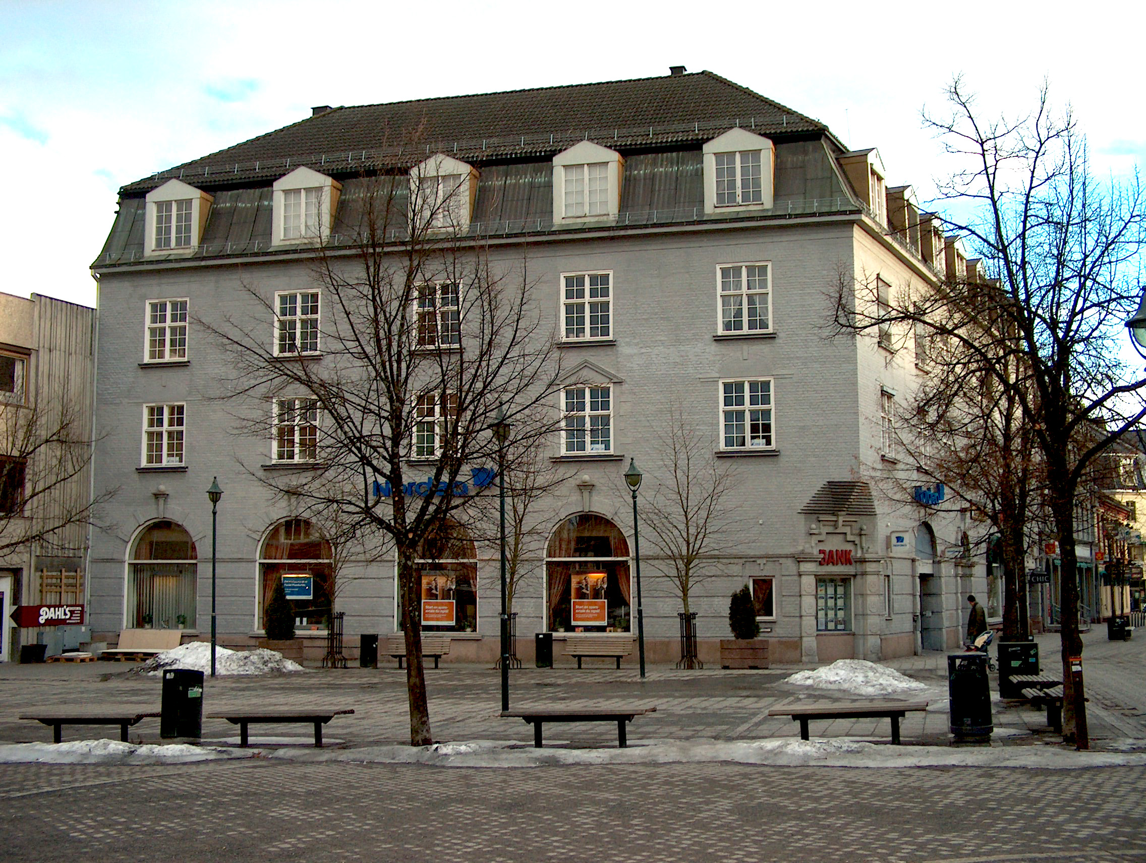 Storgaten 2 i Hønefoss (Norway), tidligere Hotell Fønix